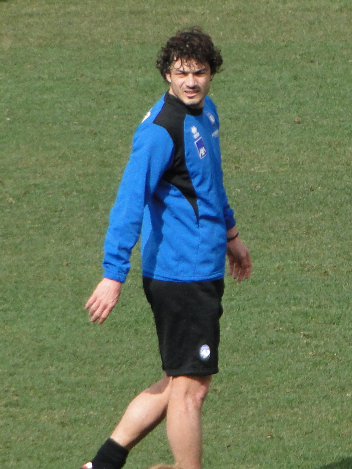 Matteo Contini, calciatore italiano